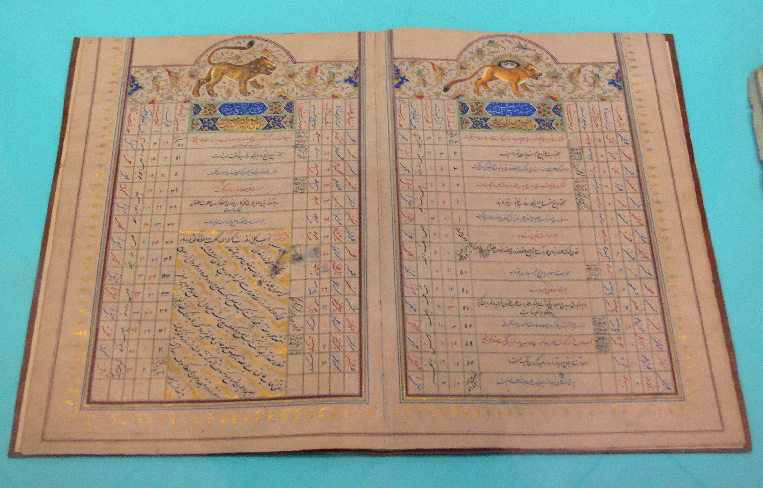 Kalender, dem Qadscharen-Herrscher Nasreddin Schah gewidmet; Iran, 1280 H (entspricht 1863 n. Chr.) Linden-Museum, Stuttgart